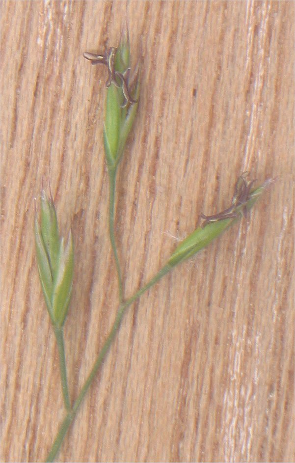 (nl: Gewoon roodzwenkgras aartjes) Festuca rubra var. commutata spikes